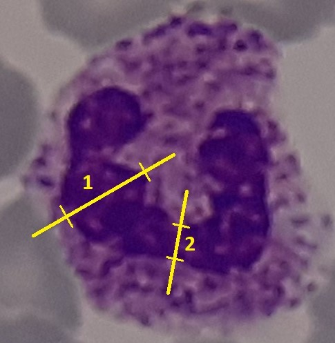 Cayado con indicación para su diferenciación con un segmentado: se ha indicado la zona de máximo grosor del núcleo (1) y de menor grosor (2). Se comprueba aproximadamente que la zona más gruesa no alcanza el criterio de triplicar el espesor de la menos gruesa, por lo que se considera como cayado o célula en banda.